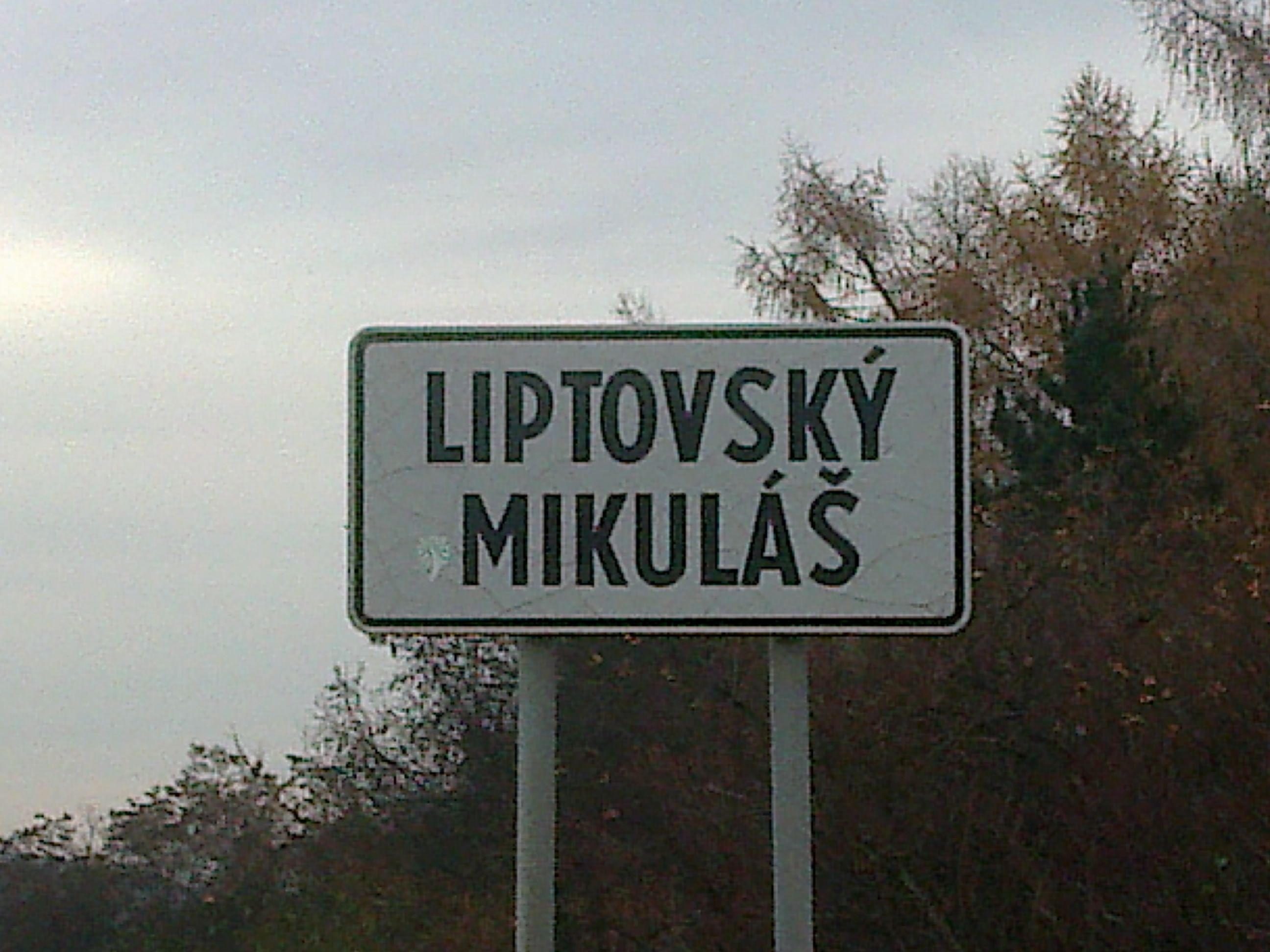 שלט הכניסה לעיר ליפטובסקי מיקולש